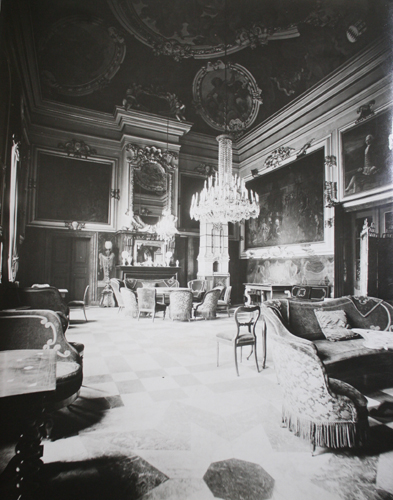 Um 1900: Blick in den rund 100 qm großen und etwa 8 Meter hohen Gartensaal des ehemaligen Lindener Schlosses im Von-Alten-Garten am Lindener Berg in Hannover ...